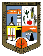 Escudo del municipio sonorense.